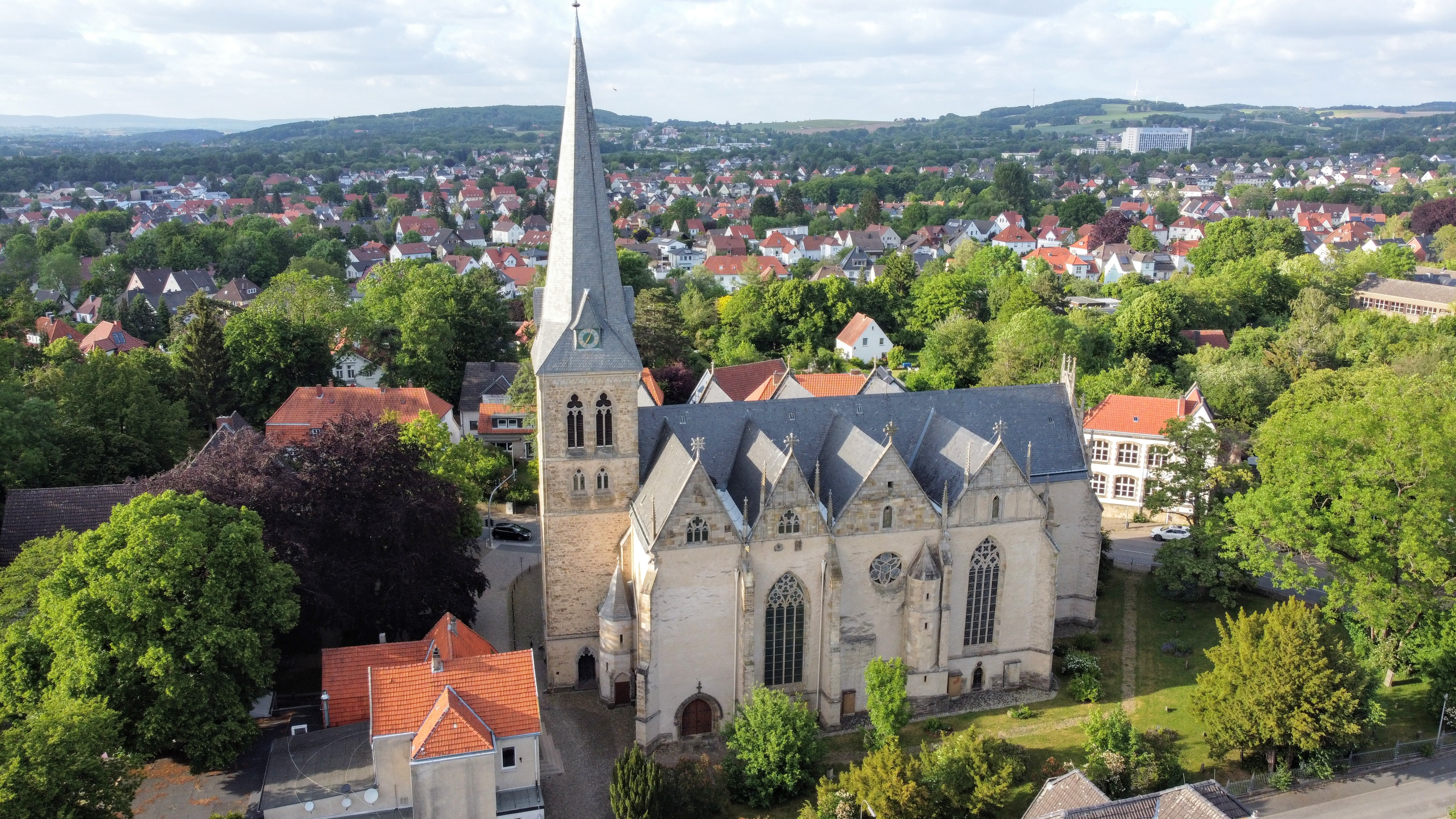 St. Marien Kirche Stiftberg Herford Luftbild